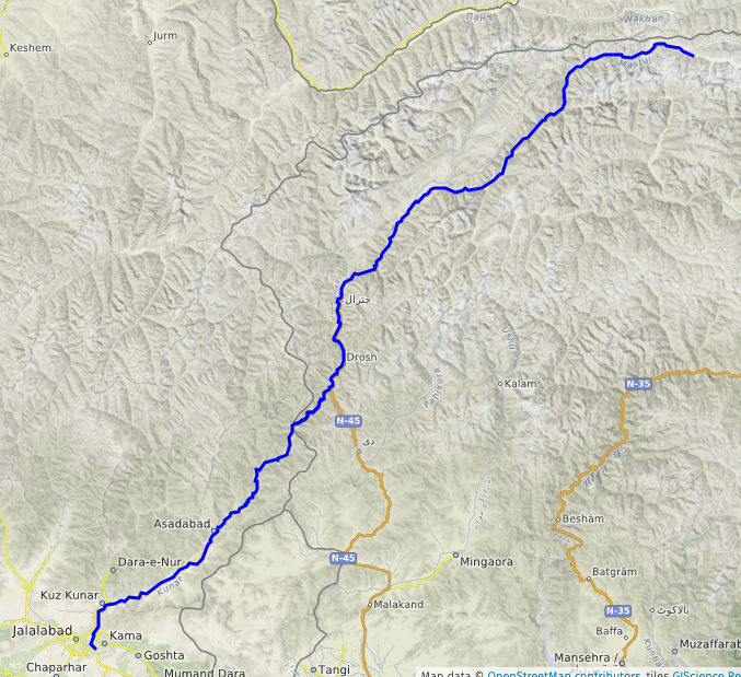 carte réalisée sur umap This map may be incomplete, and may contain errors. Don't rely solely on it for navigation.